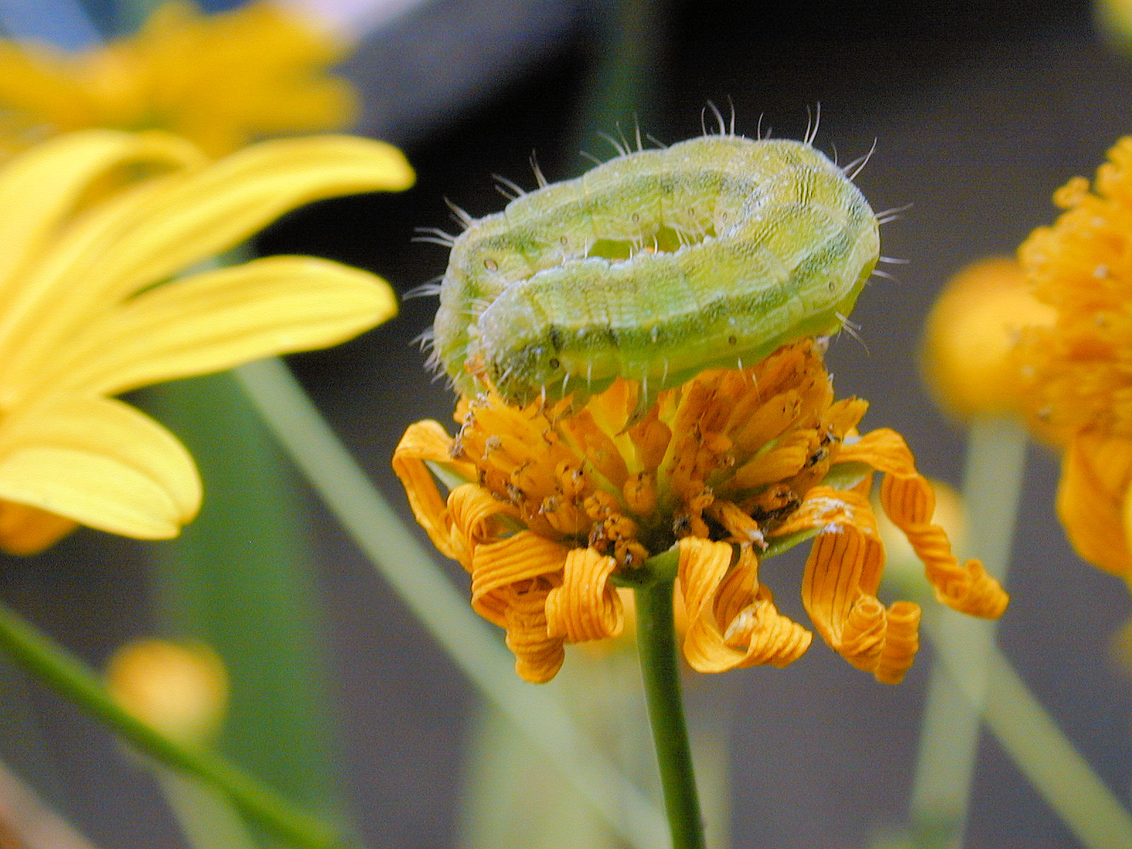 margherita gialla con bruco author: Zanchetta Fabio (faxstaff)